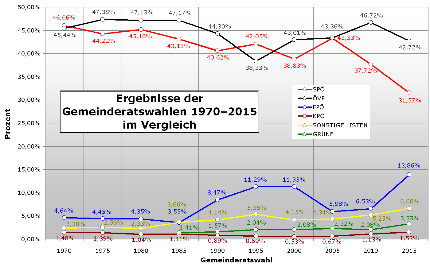 Steiermark – Wahlergebnisse der Gemeinderatswahlen 1970–2015